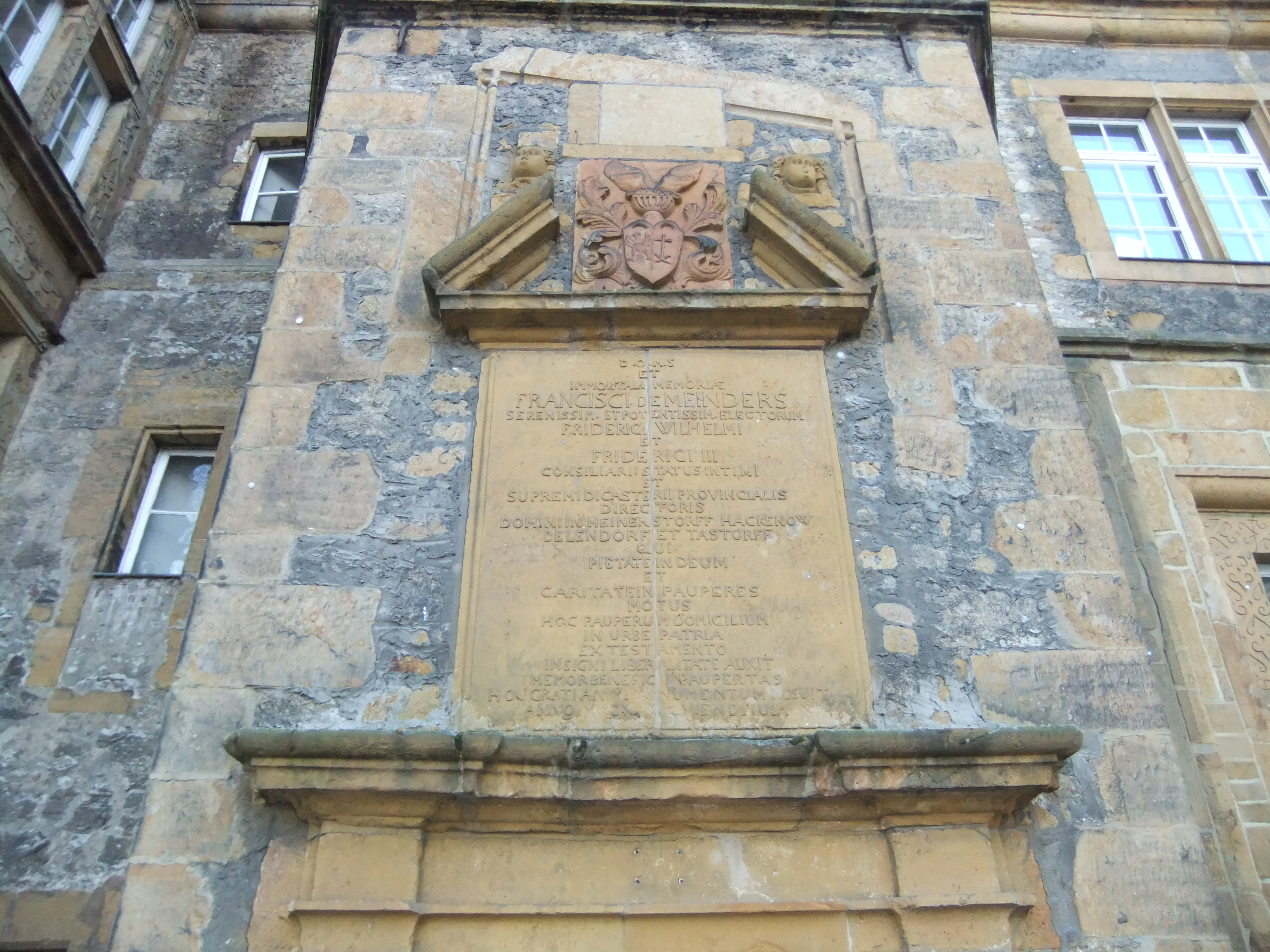 Gedenktafel an Franz von Meinders am Ratsgymnasium Bielefeld.